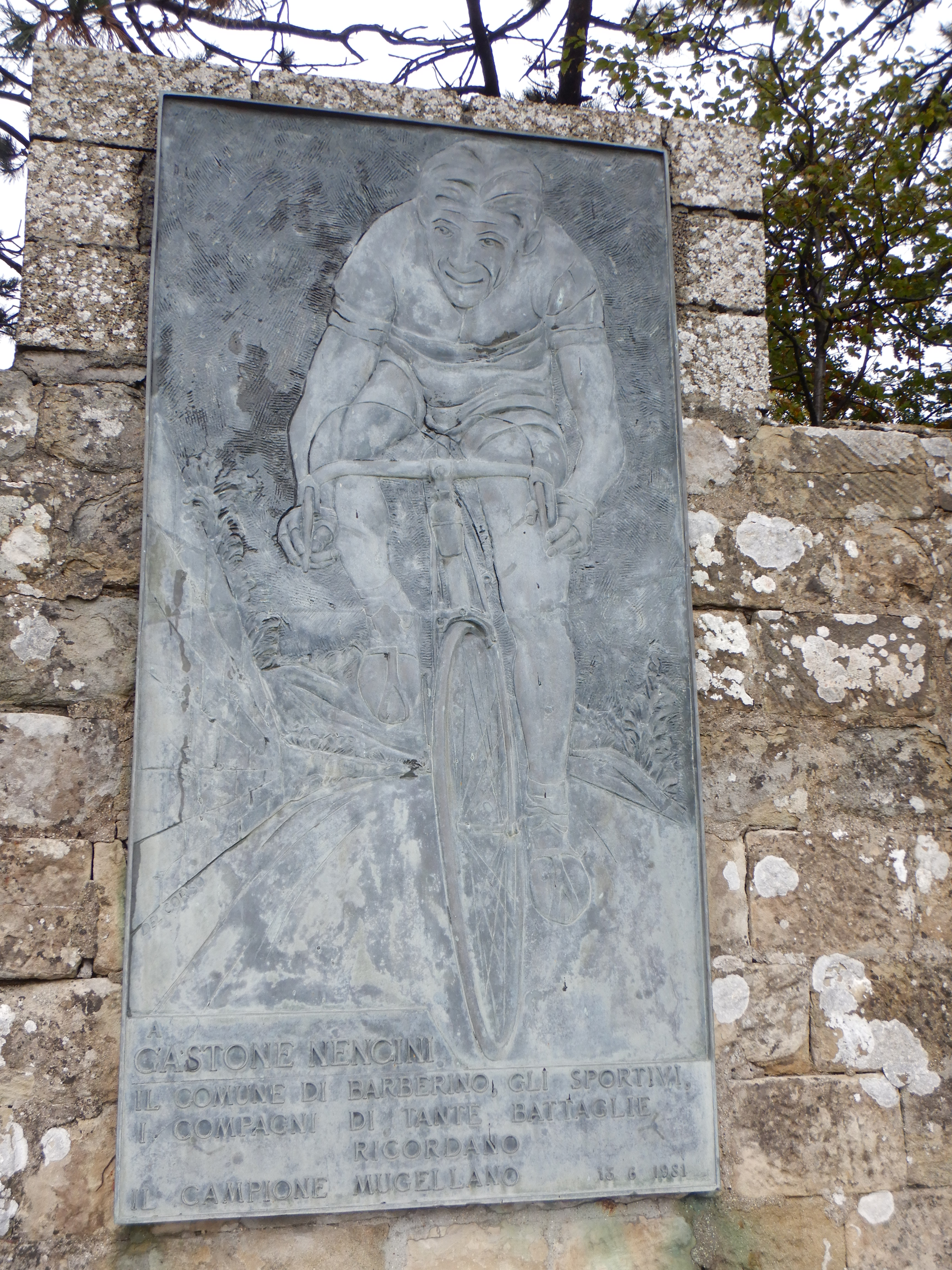 Plaque Gastone Nencini au passo della Futa